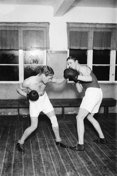 Charles Braude til venstre.